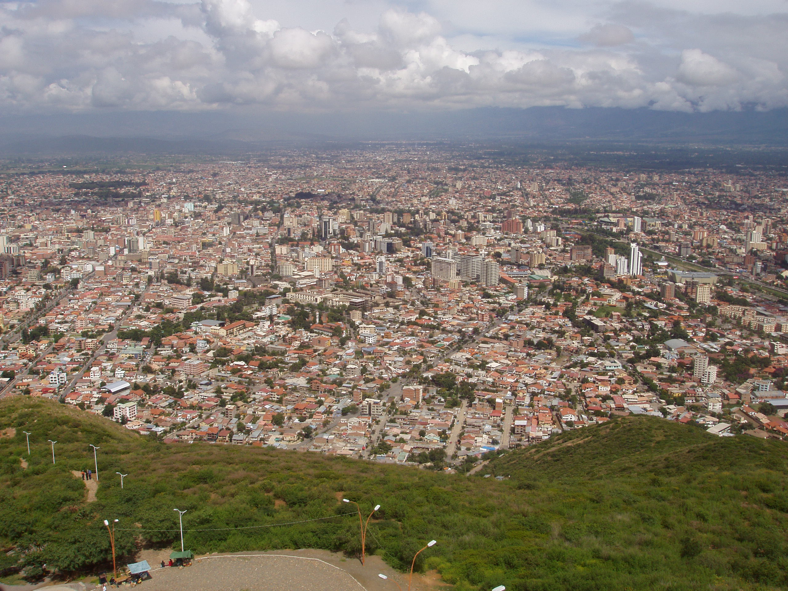 Una vista del centro de la ciudad de Cochabamba en dirección al oeste, desde el Cristo de la Concordia (este de la ciudad). Runa Simi: Juk qhawariy Qhuchapampa llaqtaq chawpinta kunti riqman, Kristu de la Kunkurdiamanta pacha (anti chiqakuqpi).